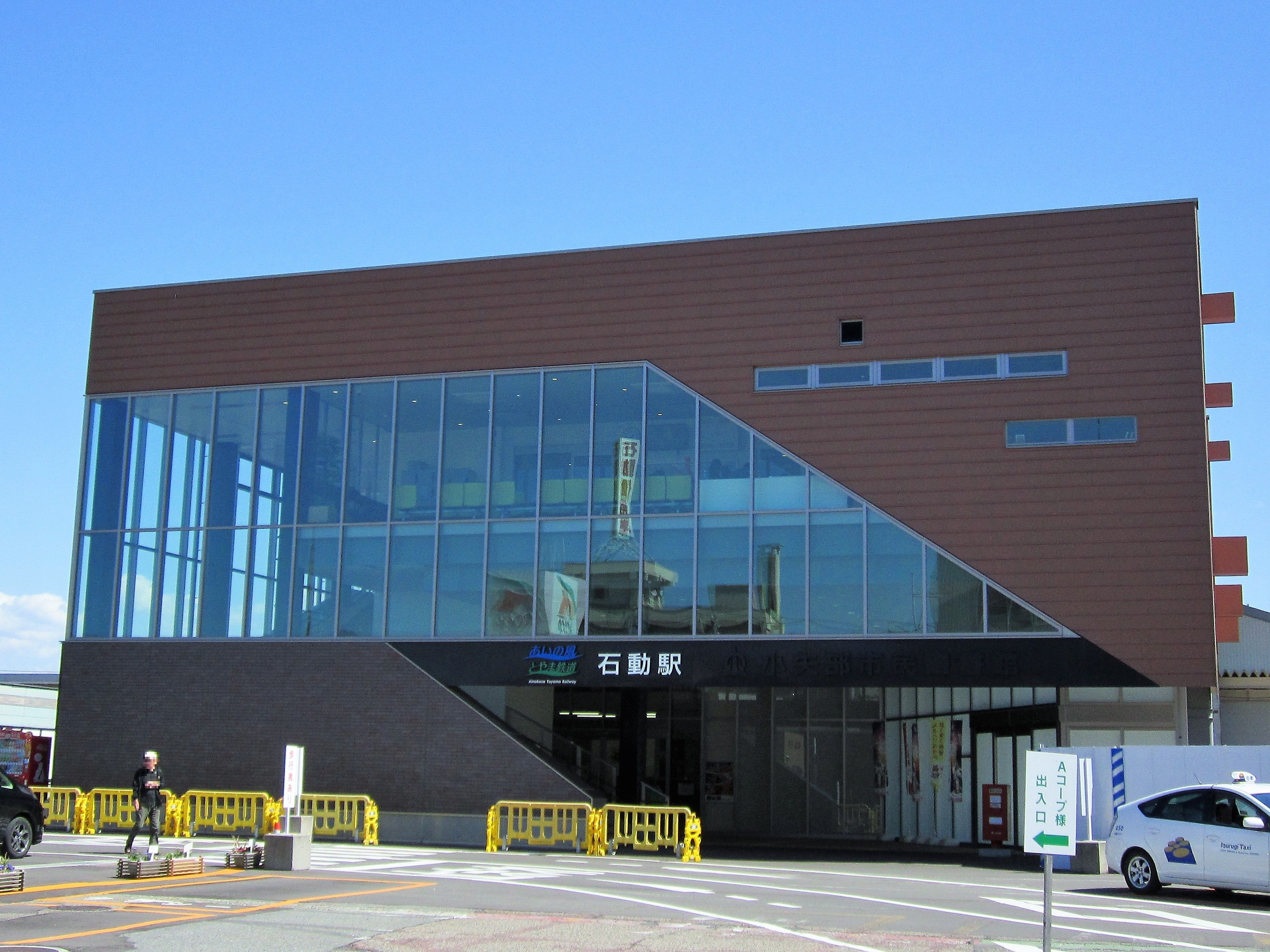 石動駅北口駅舎